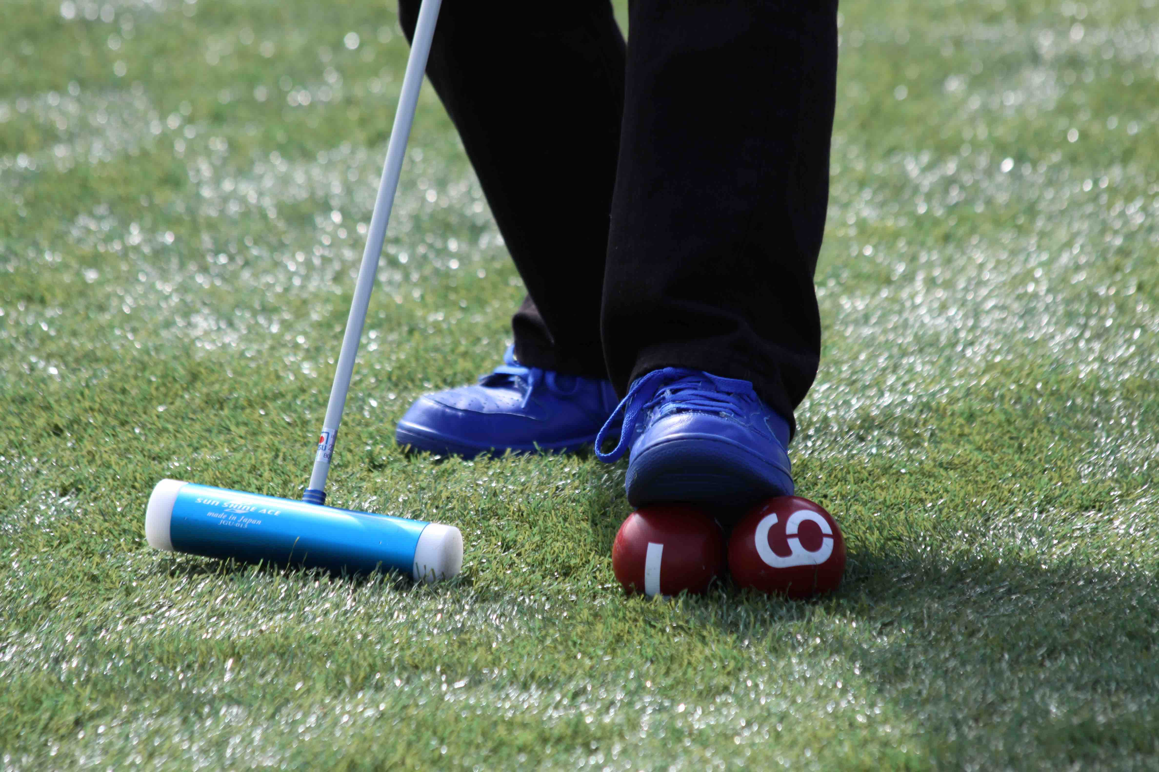 ゲートボールスパーク打撃